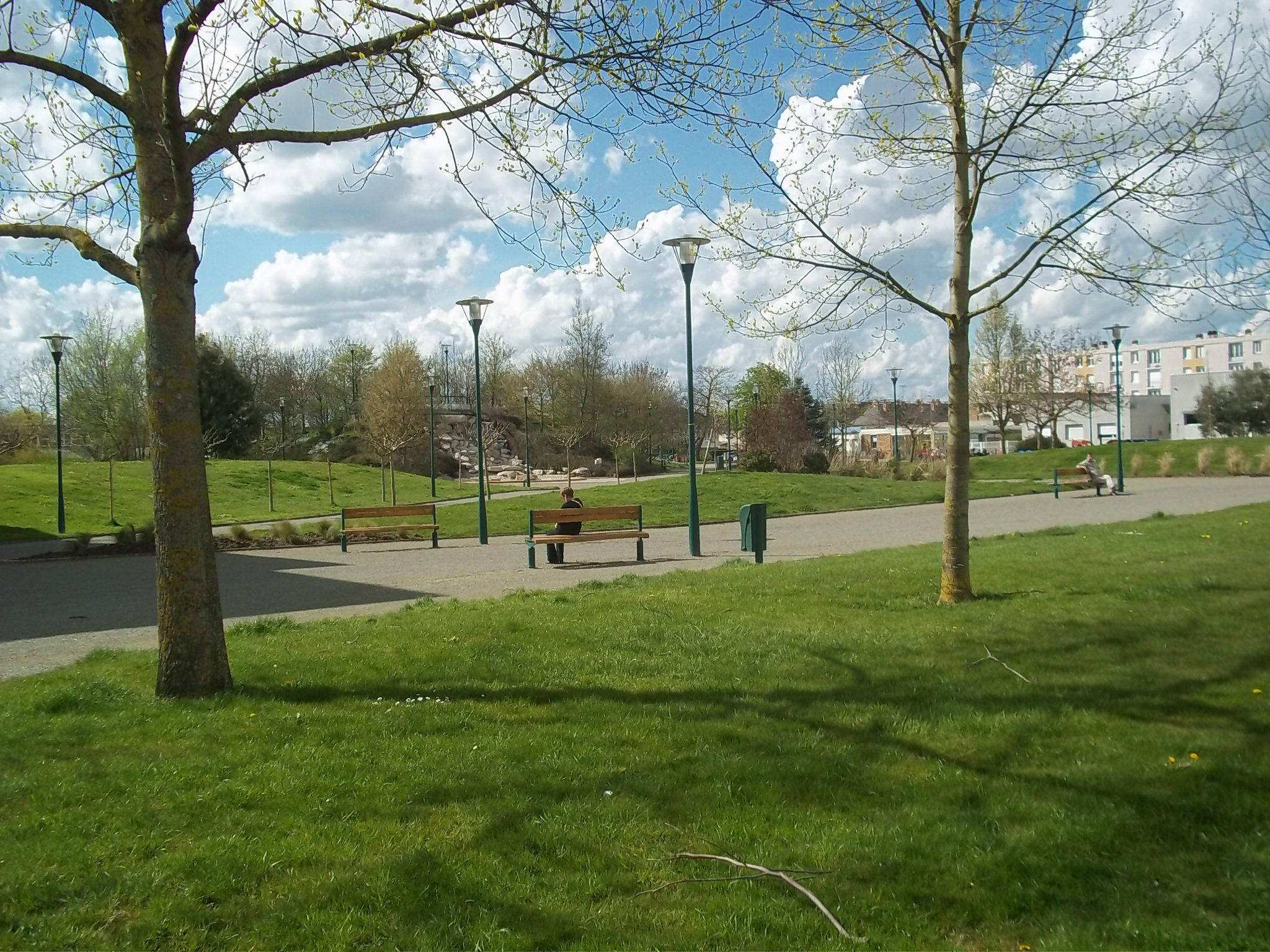 Parc Francois Mitterand à Coulaines - France